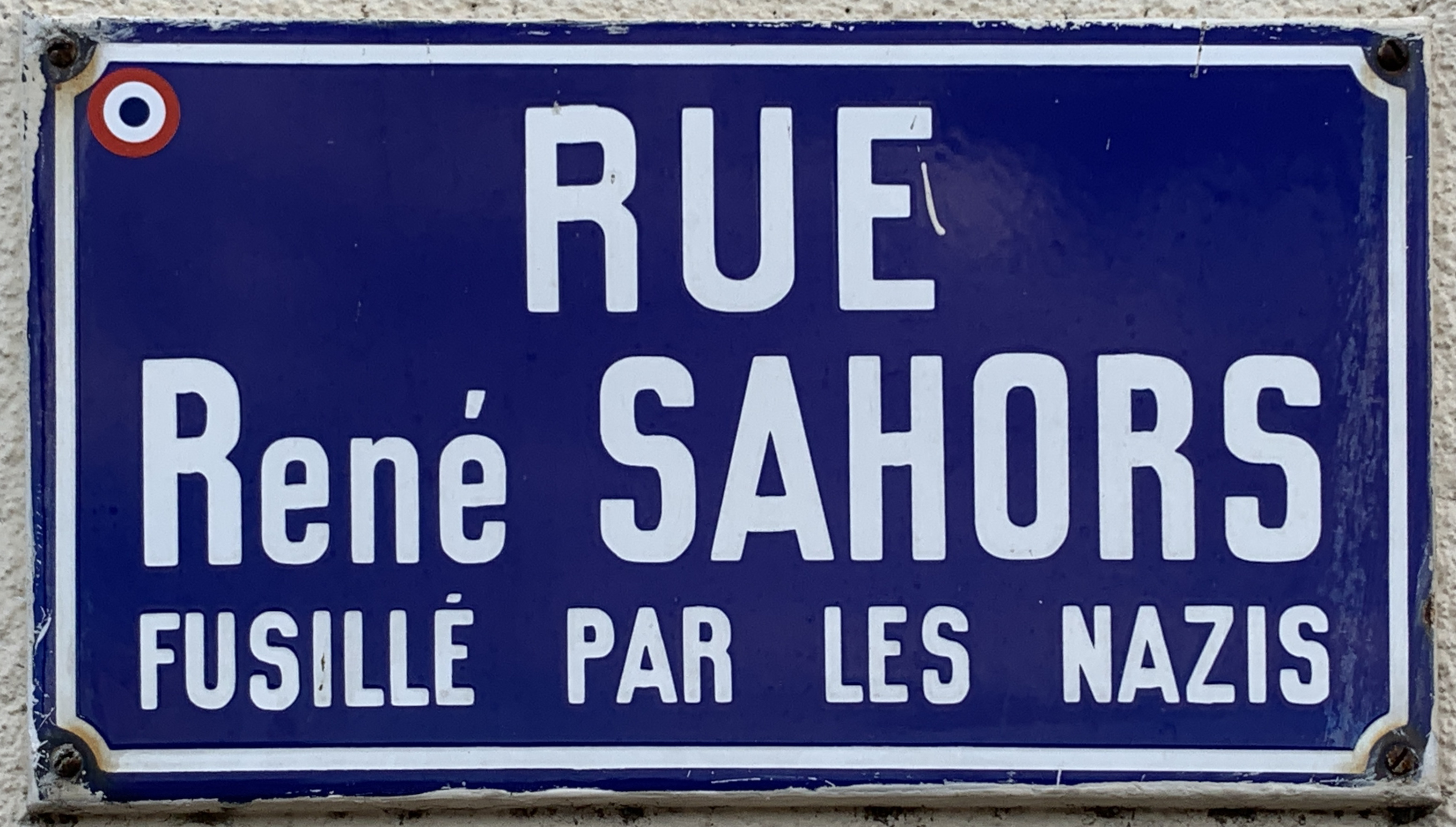 Plaque de la rue René Sahors, Vanves.